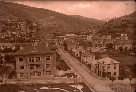 Главната улица в Чепеларе, 1930 г.